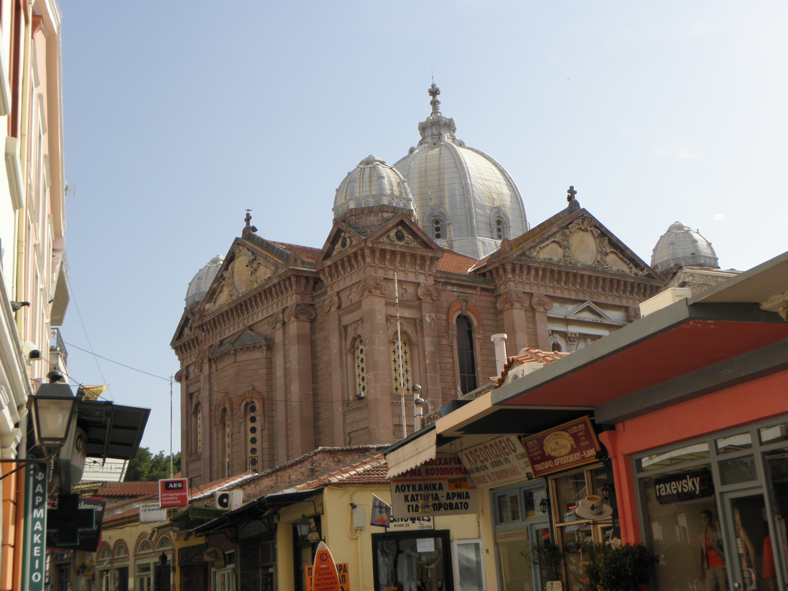 Pohled z ulice Ermou na katedrálu v Mytiléně, Lesbos